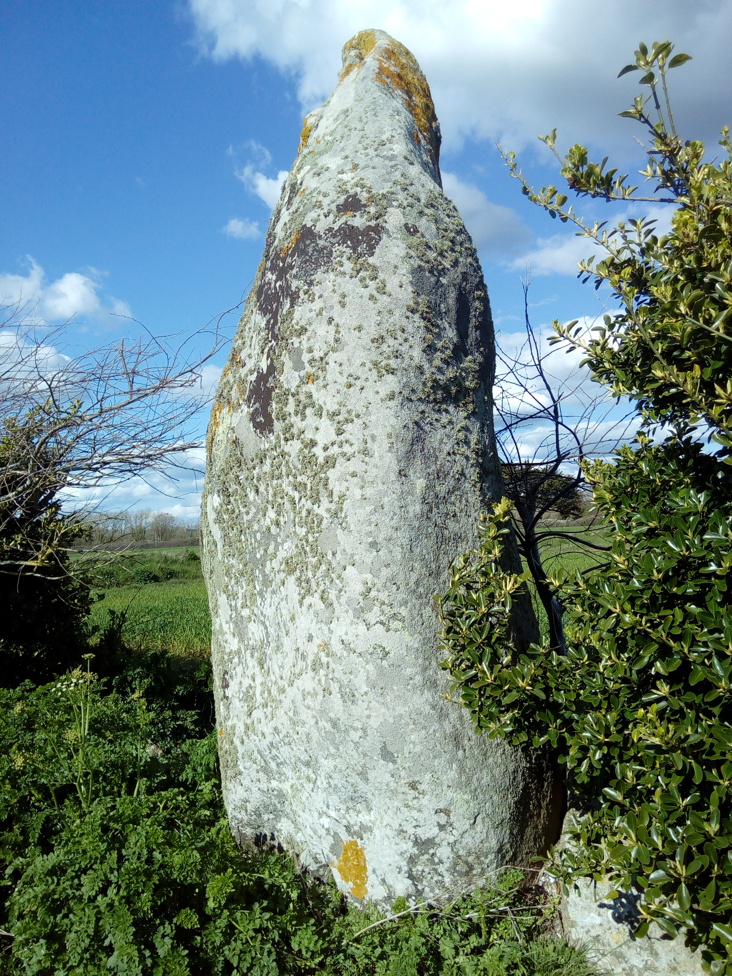 Vue de biais